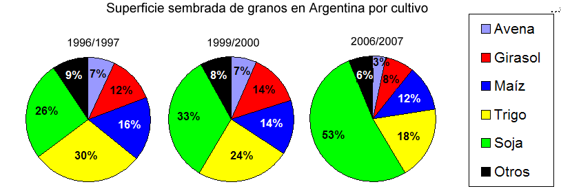 Agriculture (grains) by sector in Argentina 1996/1997 to 2006/2007. Agricultura por cultivo (granos) en Argentina 1996/1997 a 2006/2007. En porcentaje de hectáreas sembradas.